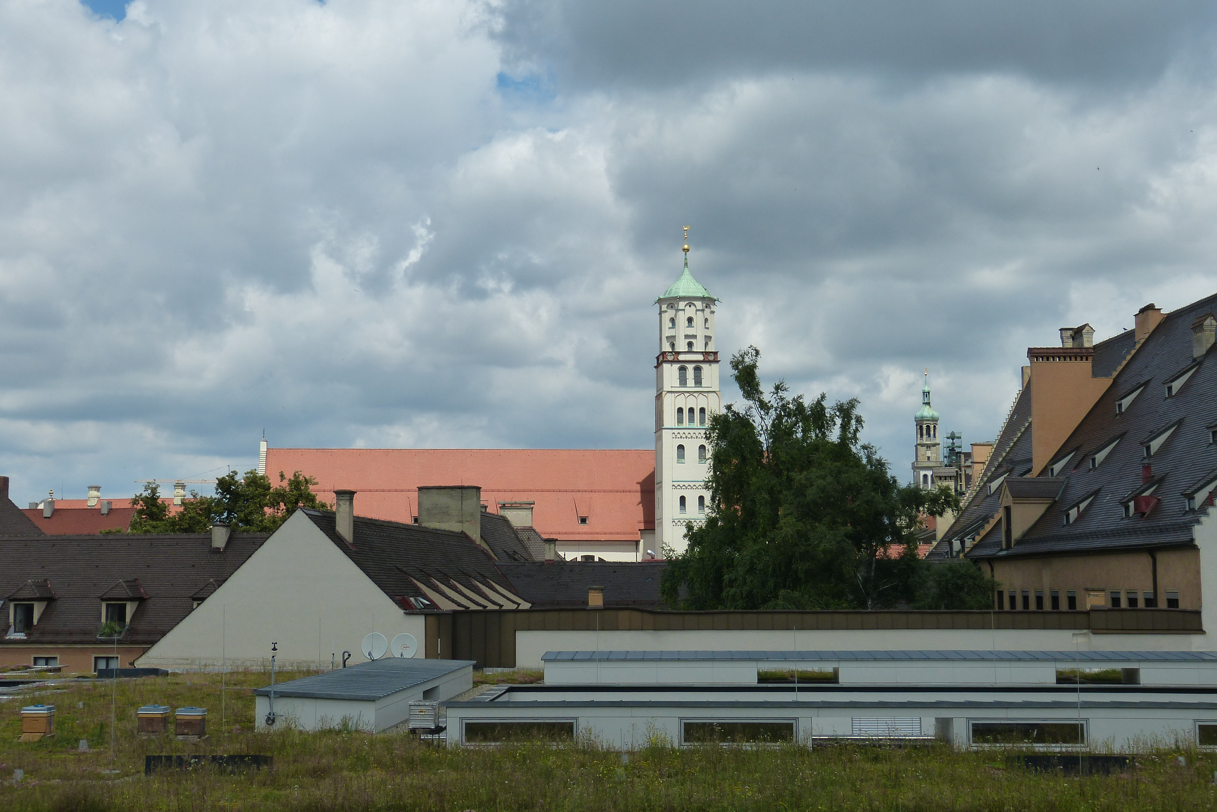 St. Moritz (Augsburg) vom Schaezlerpalais aus fotografiert. Unten im Vordergrund das begrünte Flachdach des Hotels Drei Mohren.